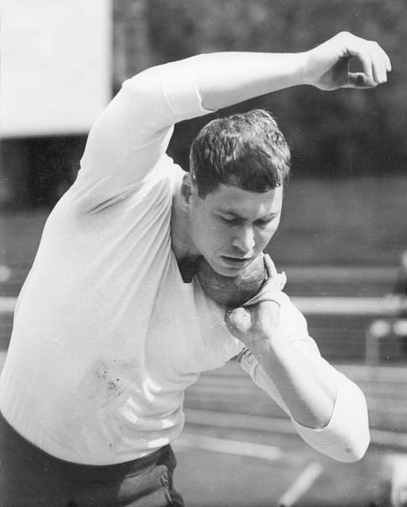 Rudolf Langer Zentralbild Kohls Tre-Pr. 31.08.1963 XIV. Deutsche Leichtathletik-Meisterschaften in Jena vom (30.08.- 01.09.1963) UBz: Rudolf Longer mit 18,10 m Bester in der Kugelstoß-Qualifikation.